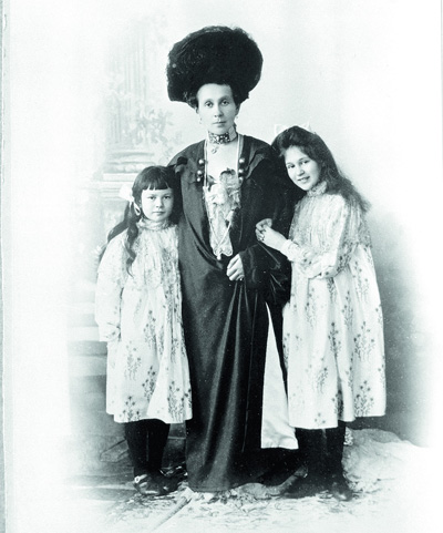 Зинаида Григорьевна Морозова (1867-1947) с дочерьми Марией (1890-1934) и Еленой (1895-после 1947)